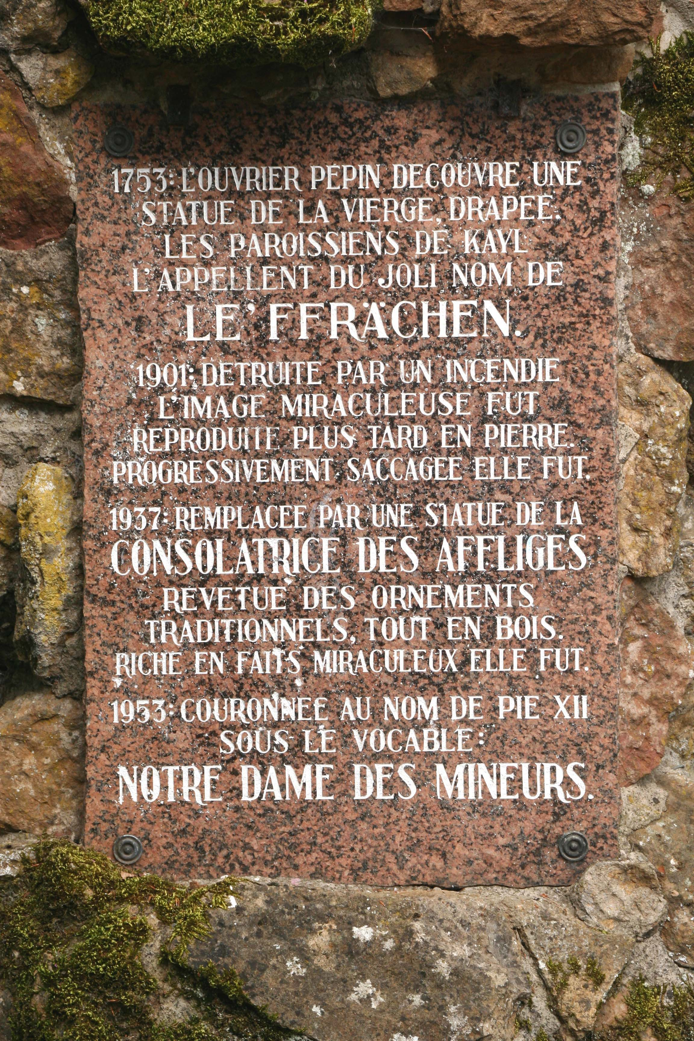 Sujet: Plack Léif'frächen Source: Eege Fot vum User:Cornischong Lizenz: GFDL